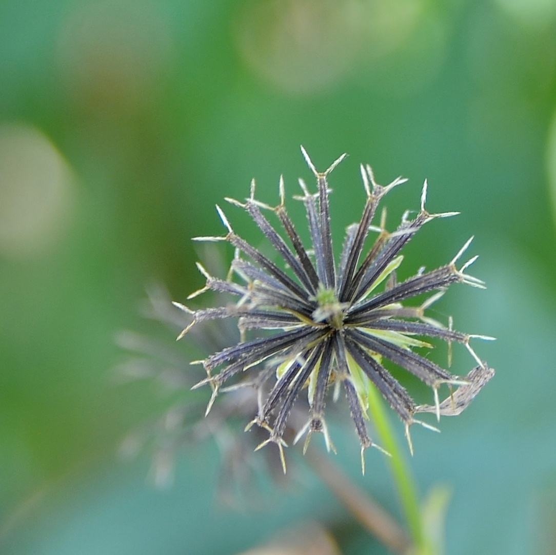 常見於路邊荒地、山坡及田間